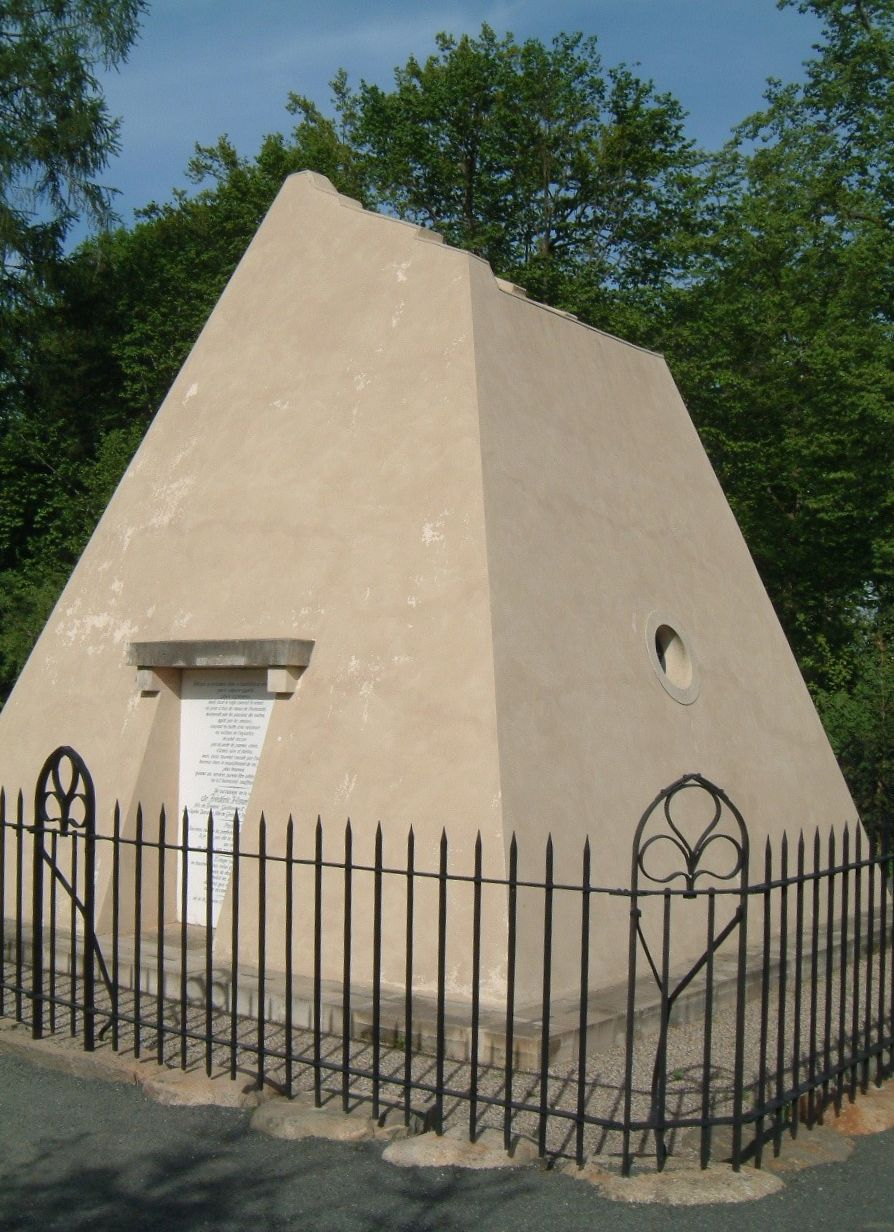 Grab des Prinzen Heinrich im Schlosspark von Rheinsberg, Deutschland.